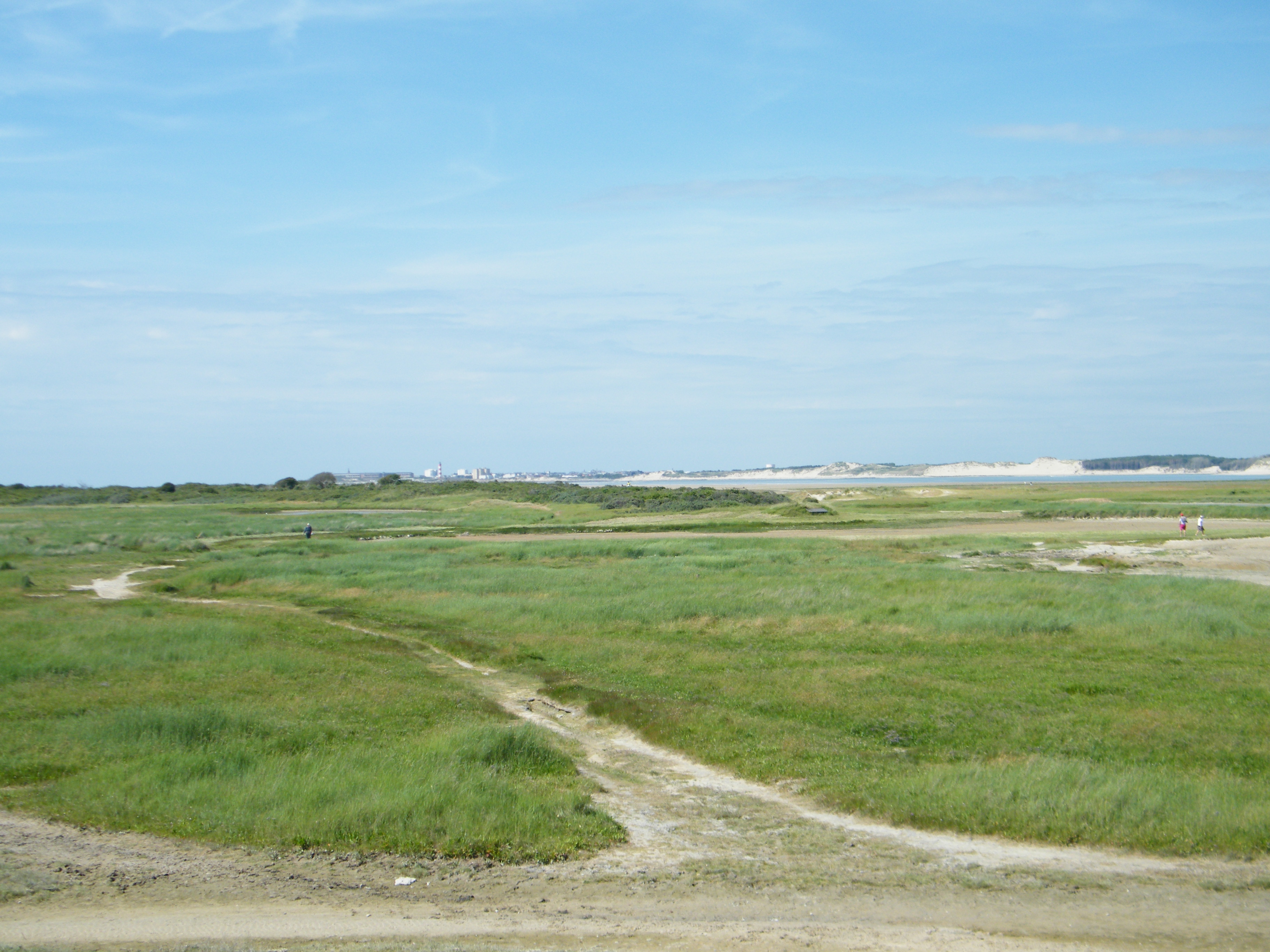 Fort-Mahon-Vue sur Berck, à partir du parking de la baie d'Authie.